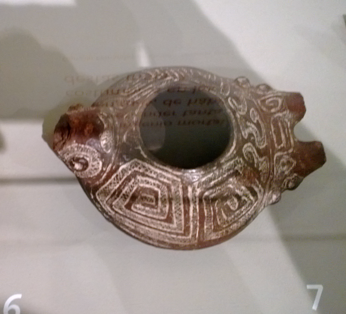 La producción de cerámica de la fase Agro II es su característica más llamativa. La cerámica de este grupo, por lo general, presenta patrones de líneas incisas, rellenas de pasta blanca o roja.